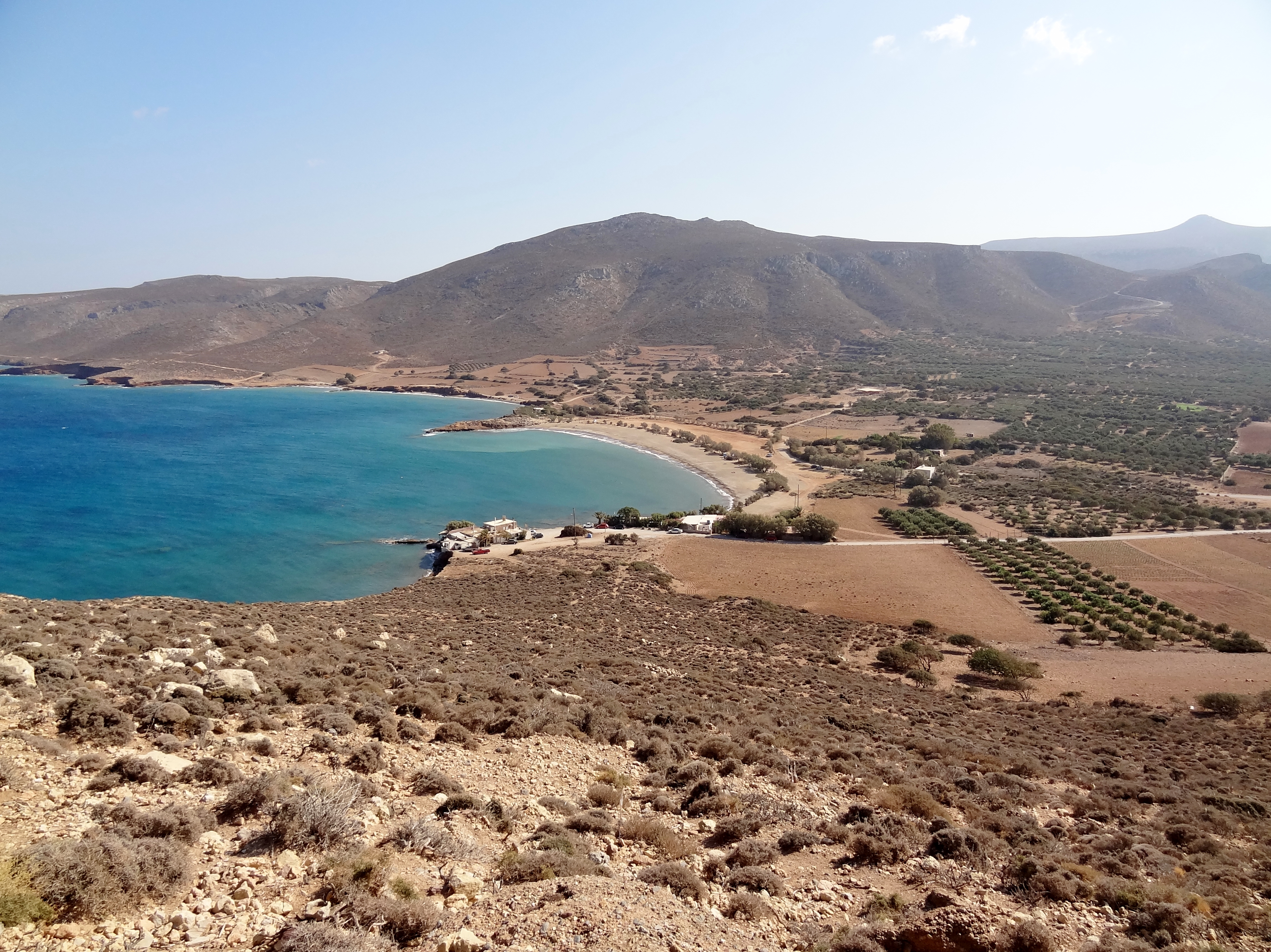 Strand von Chiona (Παραλία Χιόνα) bei Palekasto, Gemeinde Sitia, Kreta, Griechenland